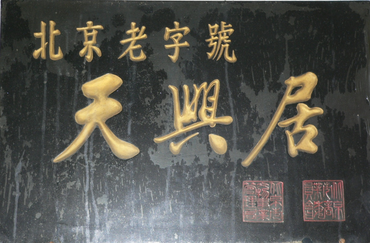 天兴居 拍摄